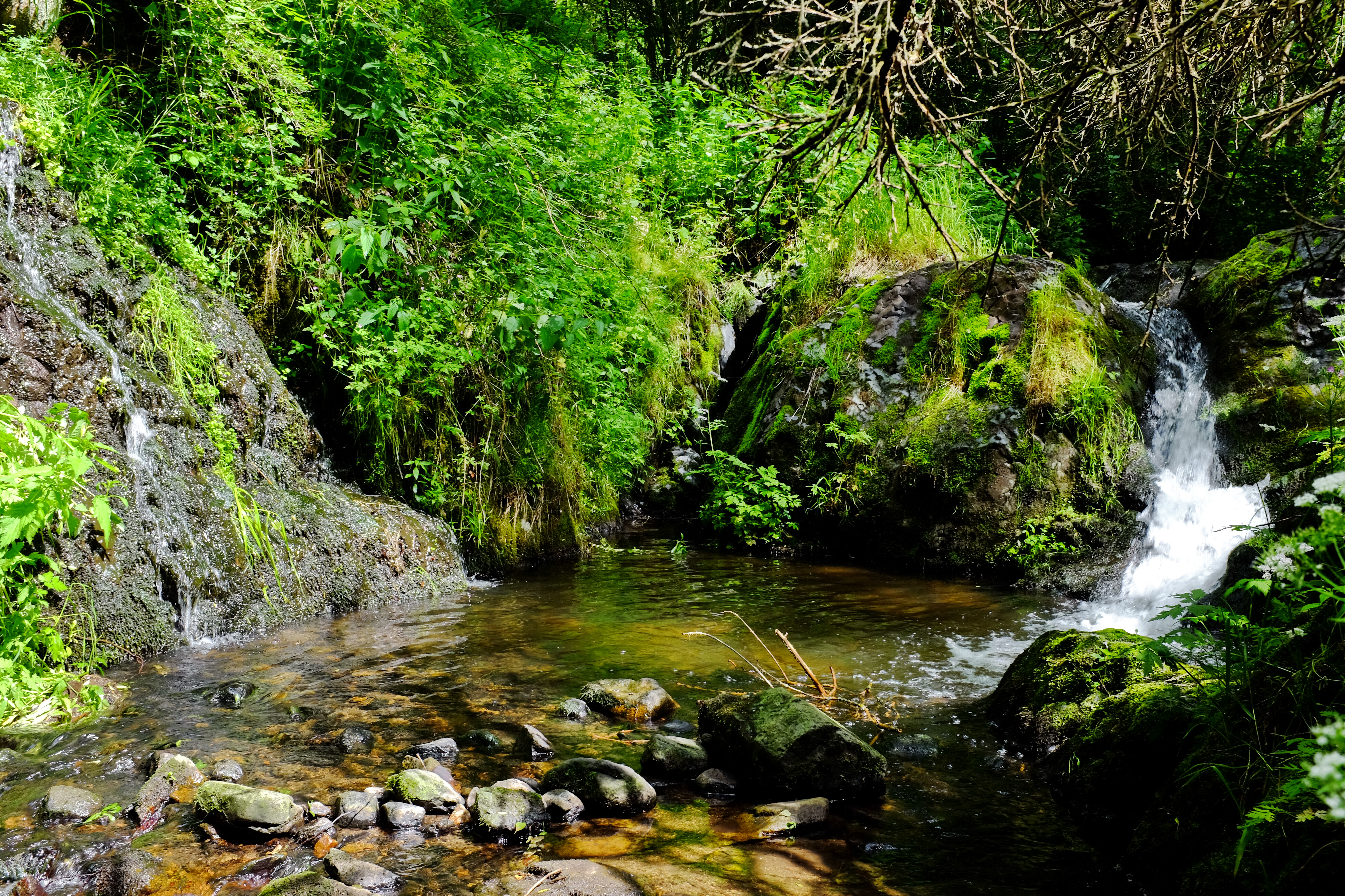 Lučinsko-svatoborské vodopády, dvojvodopád na soutoku Lučinského a bezejmenného potoka (lokálně jako Svatoborský potok), nad obcí Dubina, Doupovské hory